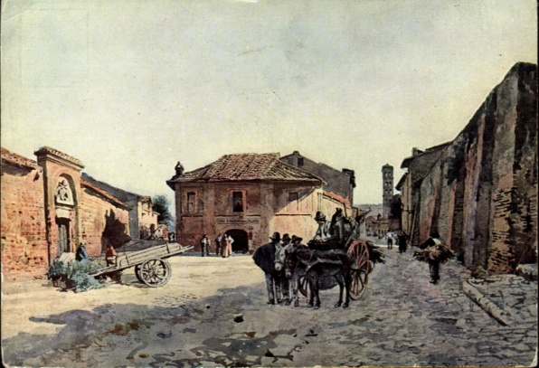 Via della Salara a Marmorata in Rome (rione Ripa). La via antica seguiva l'attuale tracciato del lungotevere Aventino, serviva i magazzini del sale proveniente da Ostia ed era il percorso dei pellegrini diretti alla basilica di S. Paolo.